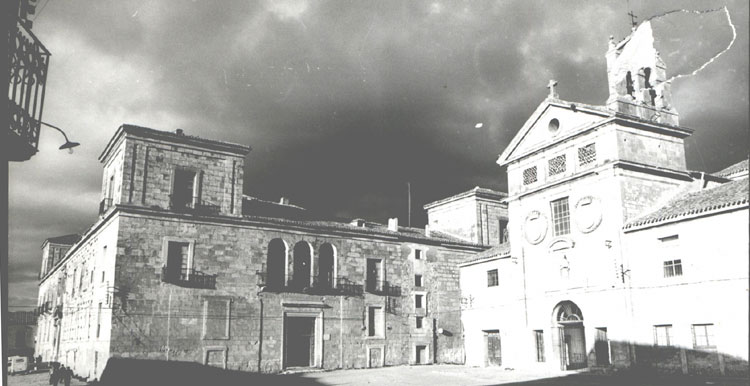 Palacio Ducal. Lateral - Lerma (Burgos) - Fotografía B/N